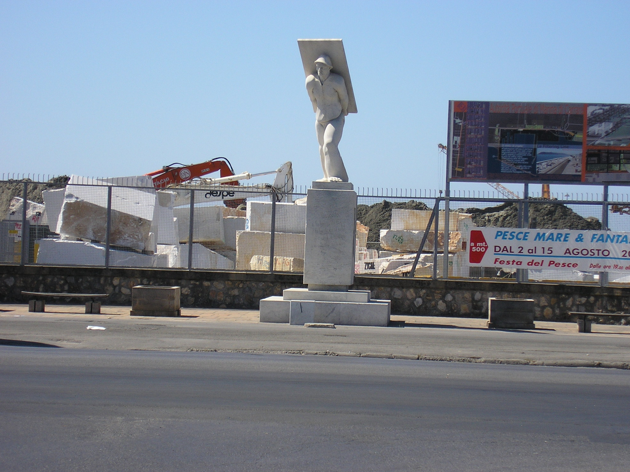 Marina di Carrara, monumento al "buscaiol" (lavorante alla giornata, normalmente addetto a lavori pesanti nel porto o nelle cave di marmo)